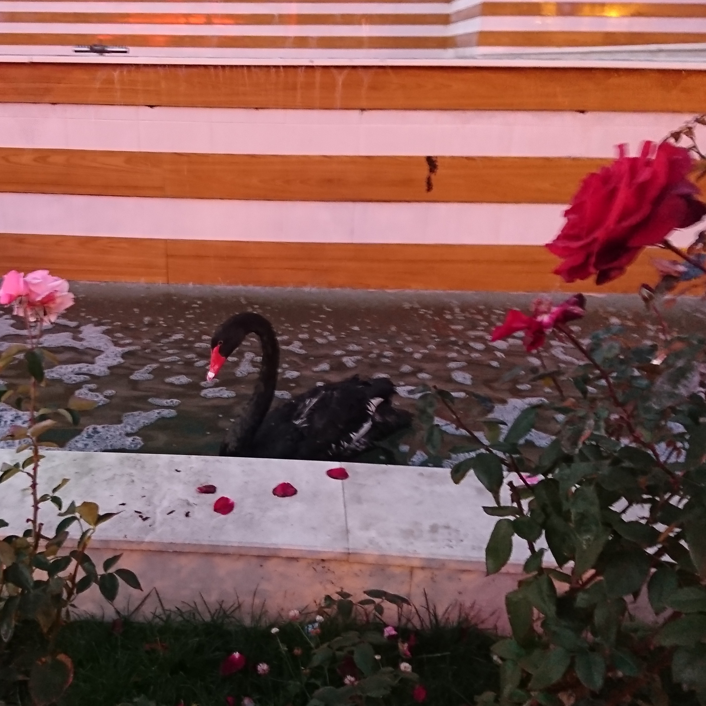 Черен лебед и рози.